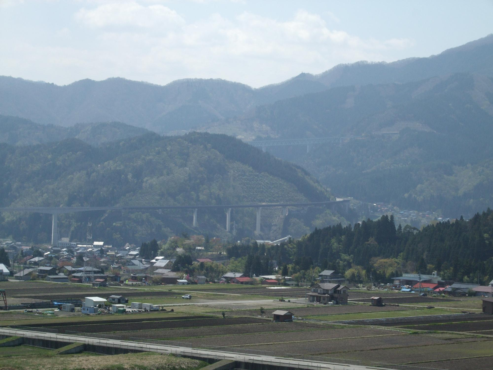 中部縦貫自動車道 油坂峠道路（山すそに沿って福井県へ上って行く） 2008.4.22 投稿者が撮影